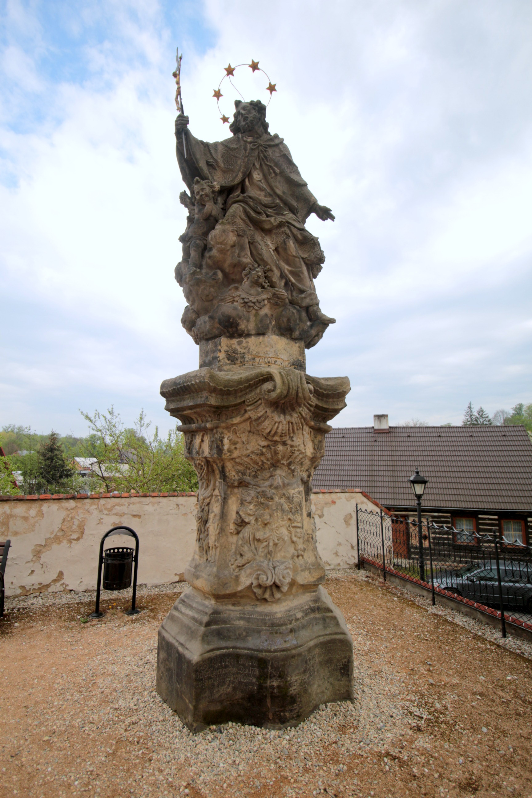 Mimoňský špitál, dnes Městské muzeum v Mimoni